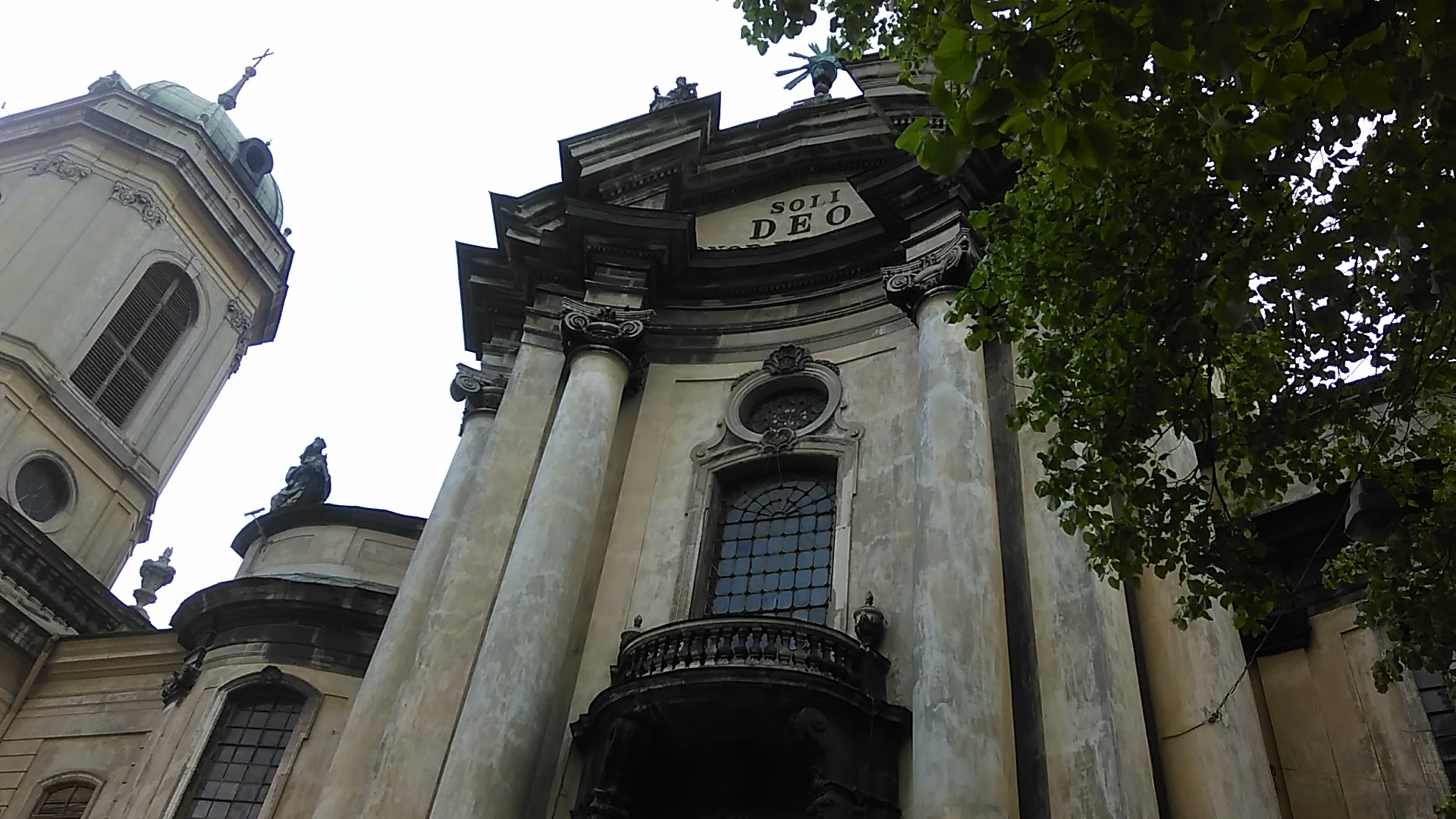 Фасад Домініканського собору м. Львів